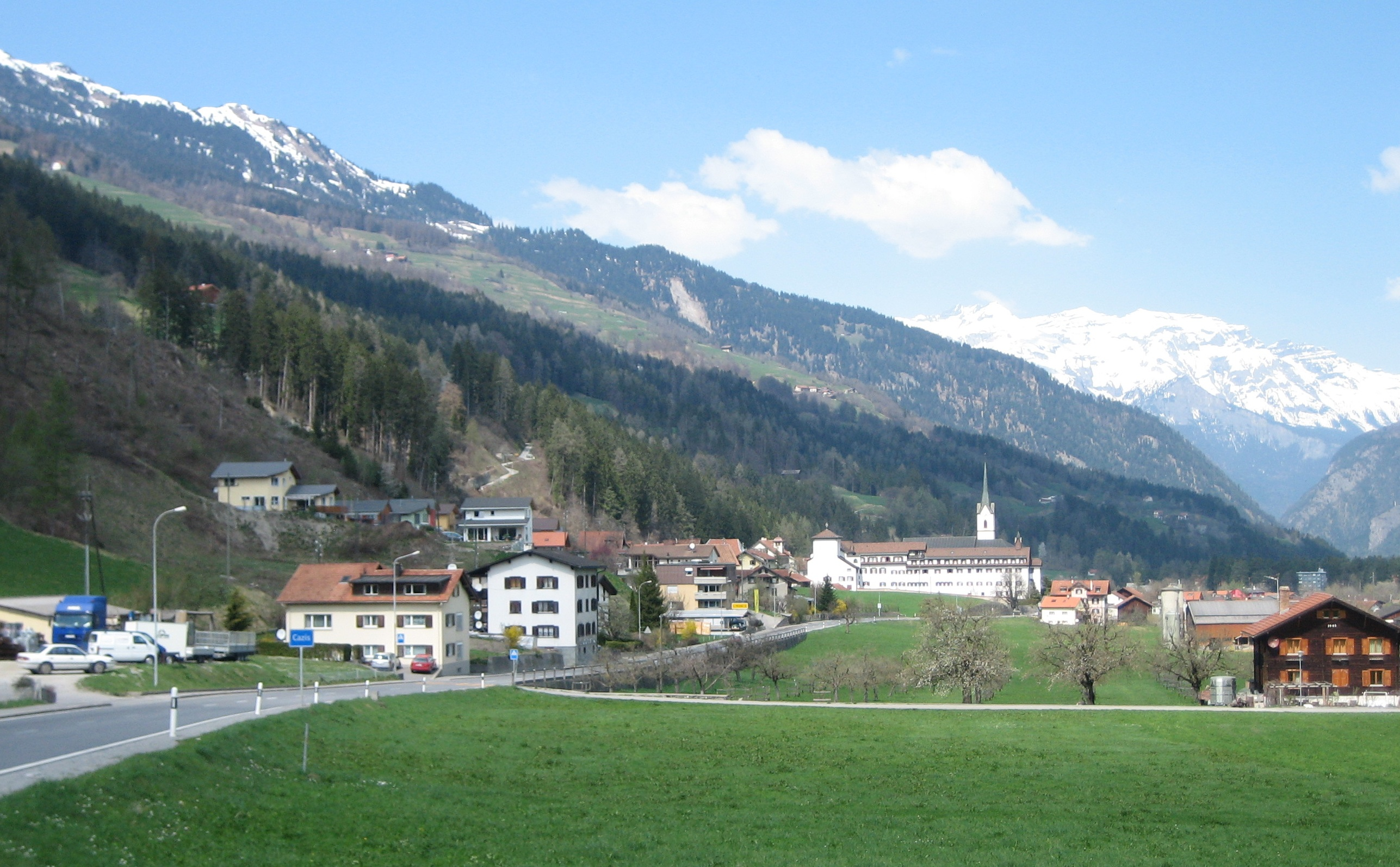 Cazis, Ansicht von Süden